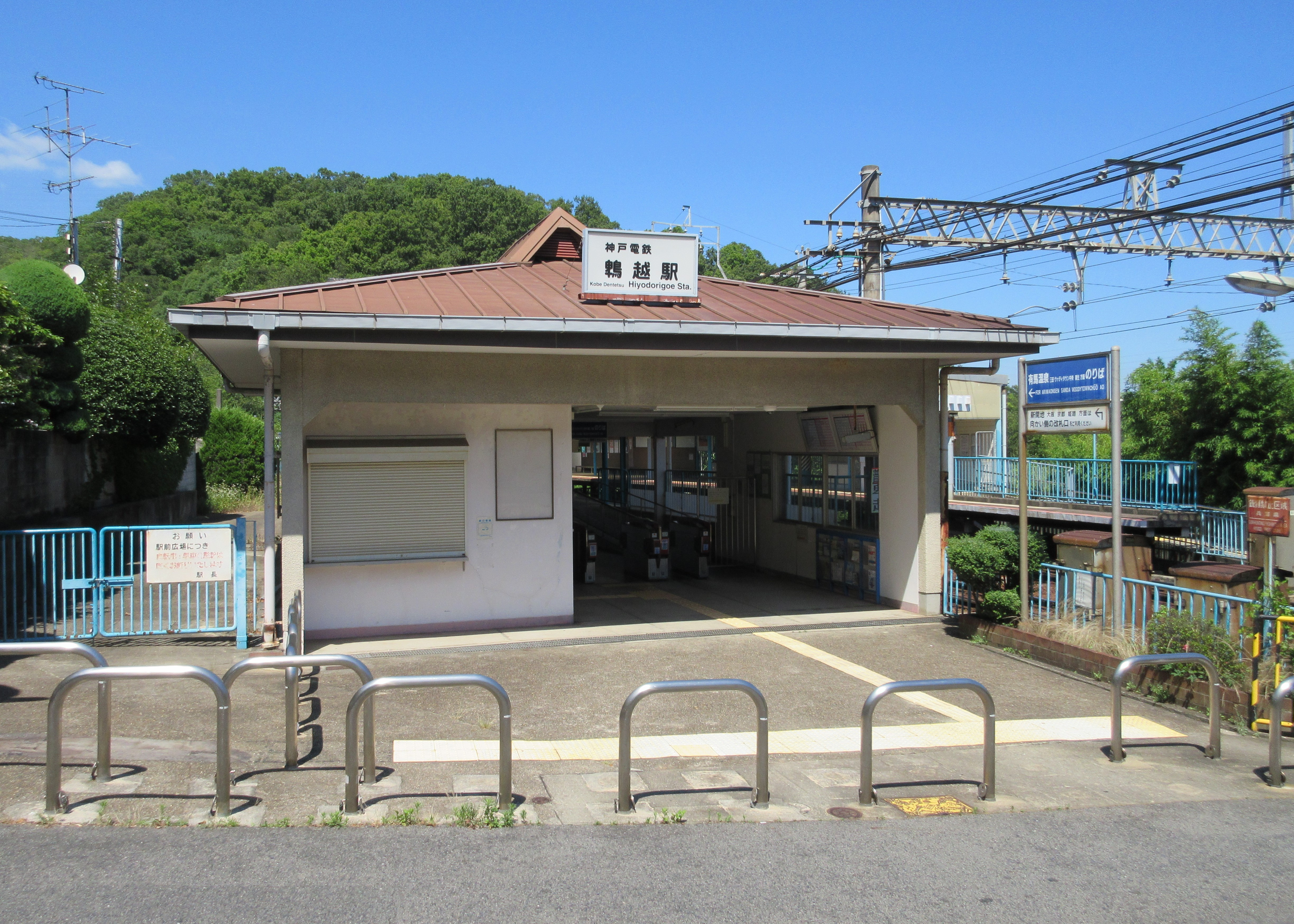 神戸電鉄鵯越駅